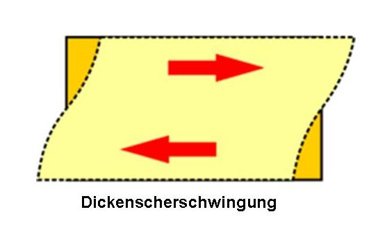 Dickenscherwingungsmodus von Keramikresonatoren